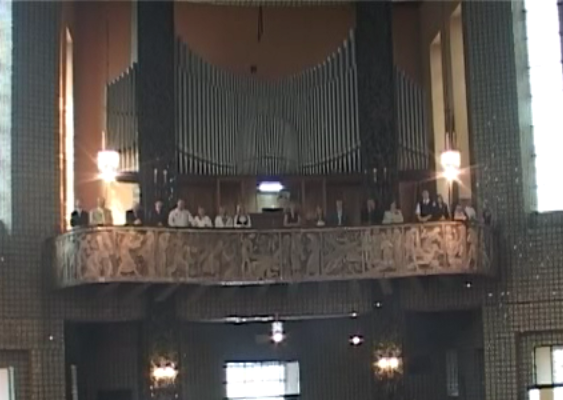 Widok na organy w kościele parafialnym pw. św. Cyryla i Metodego